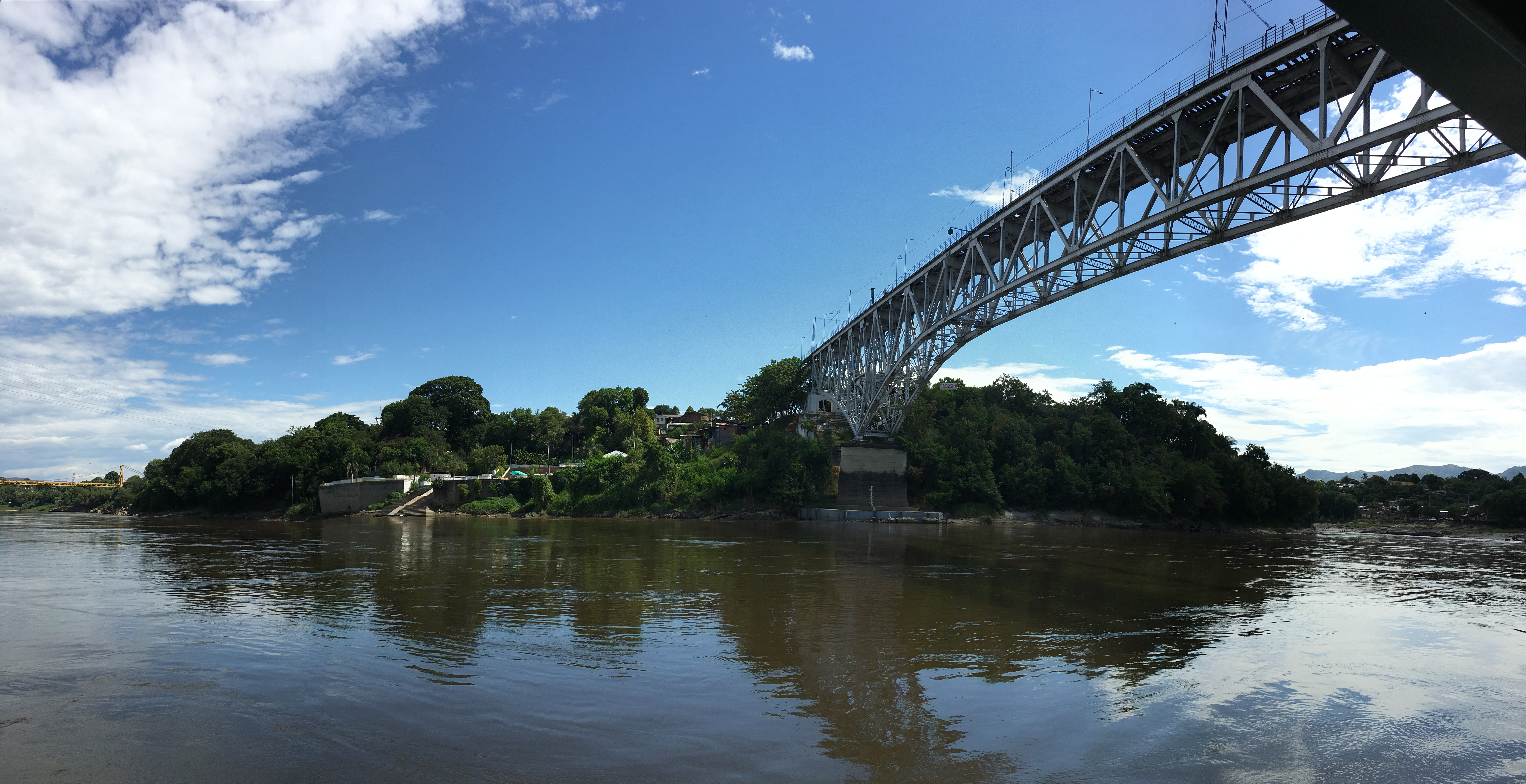 Rio Magdalena, Girardot Colombia.